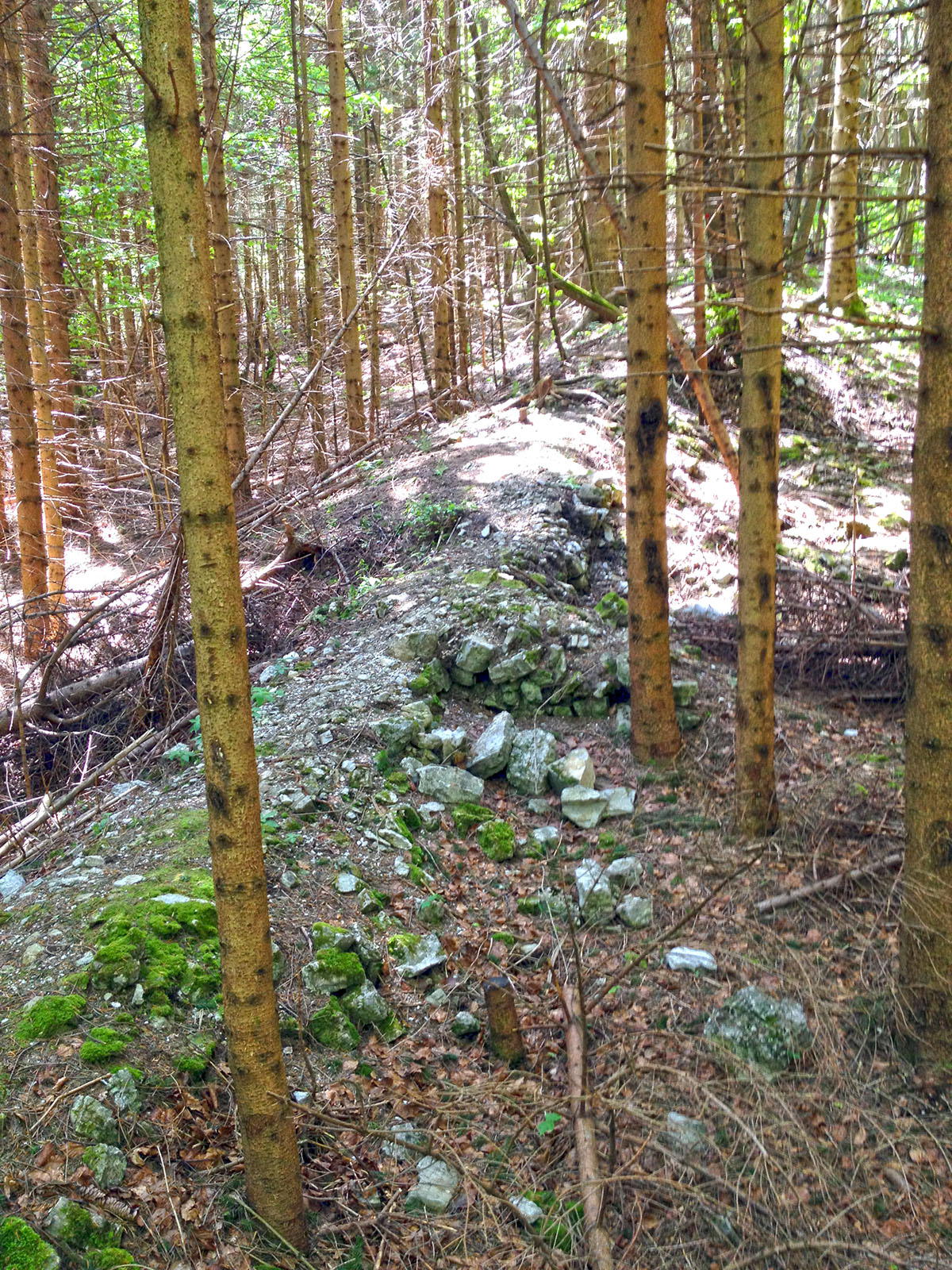 Ostaline rimskega zapornega zidu (Claustra Alpium Iuliarum) pri Rakitni